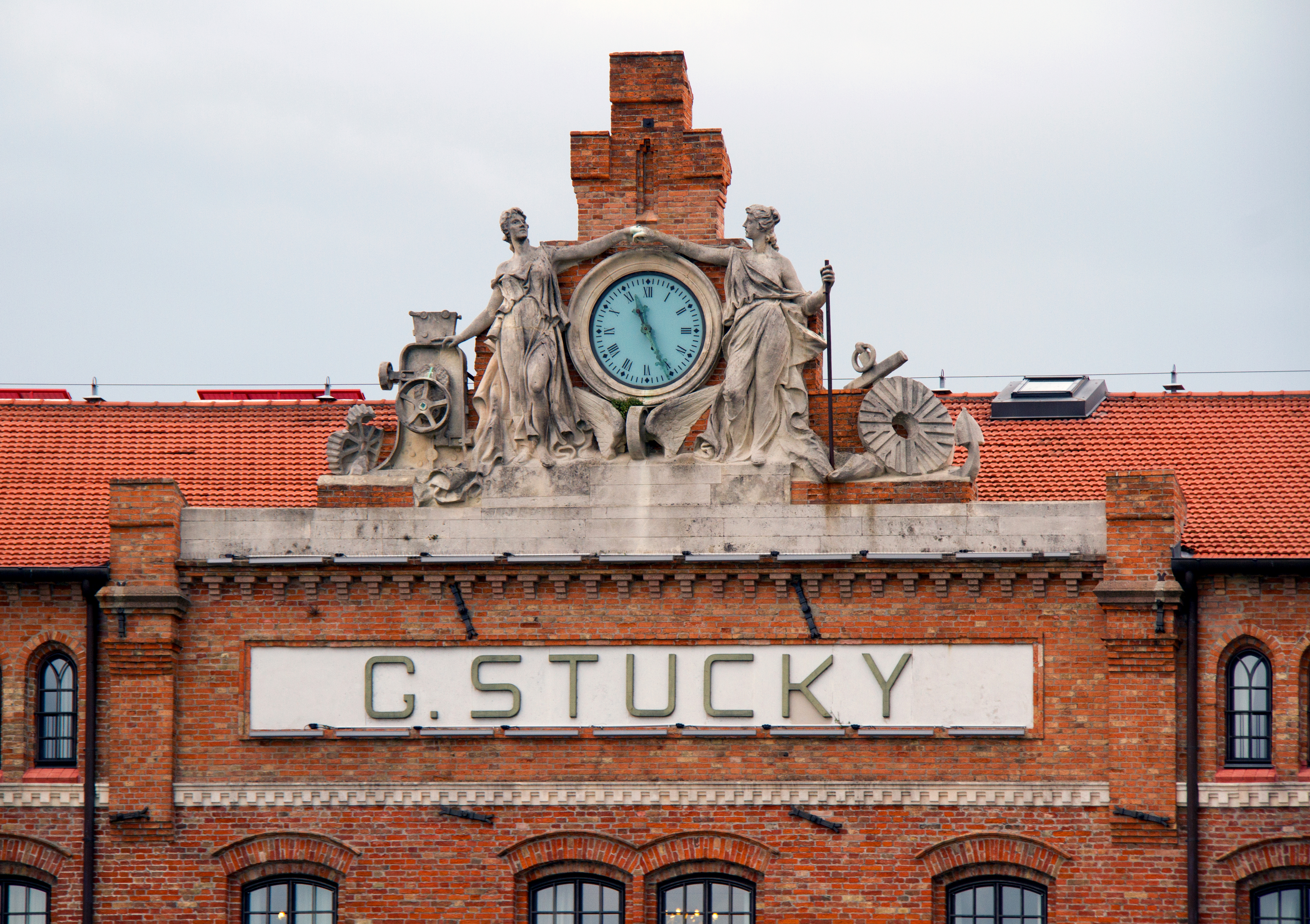 G Stucky Building Venice 2